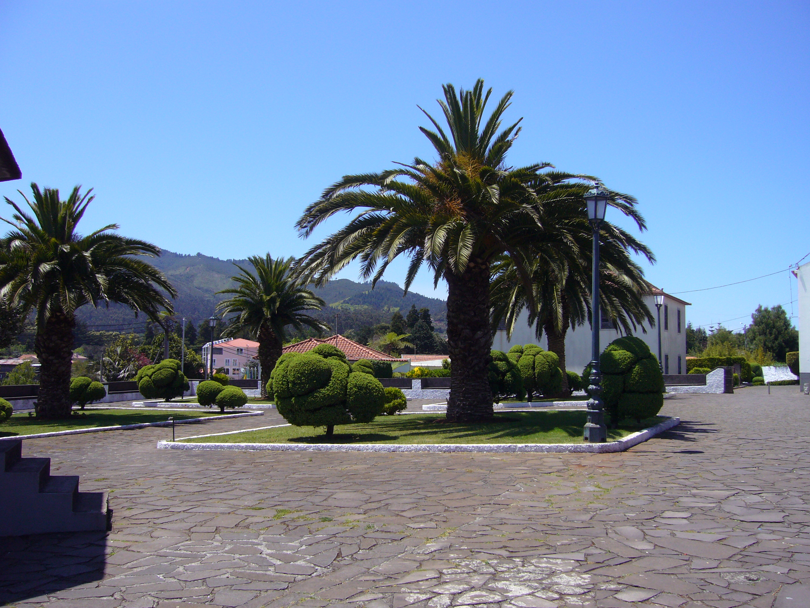 Townsquare at Santo António da Serra